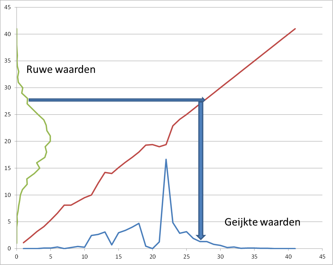 Het ontstaan van een multimodale distributie uit een normale vrdeling door een hobbelige ijklijn